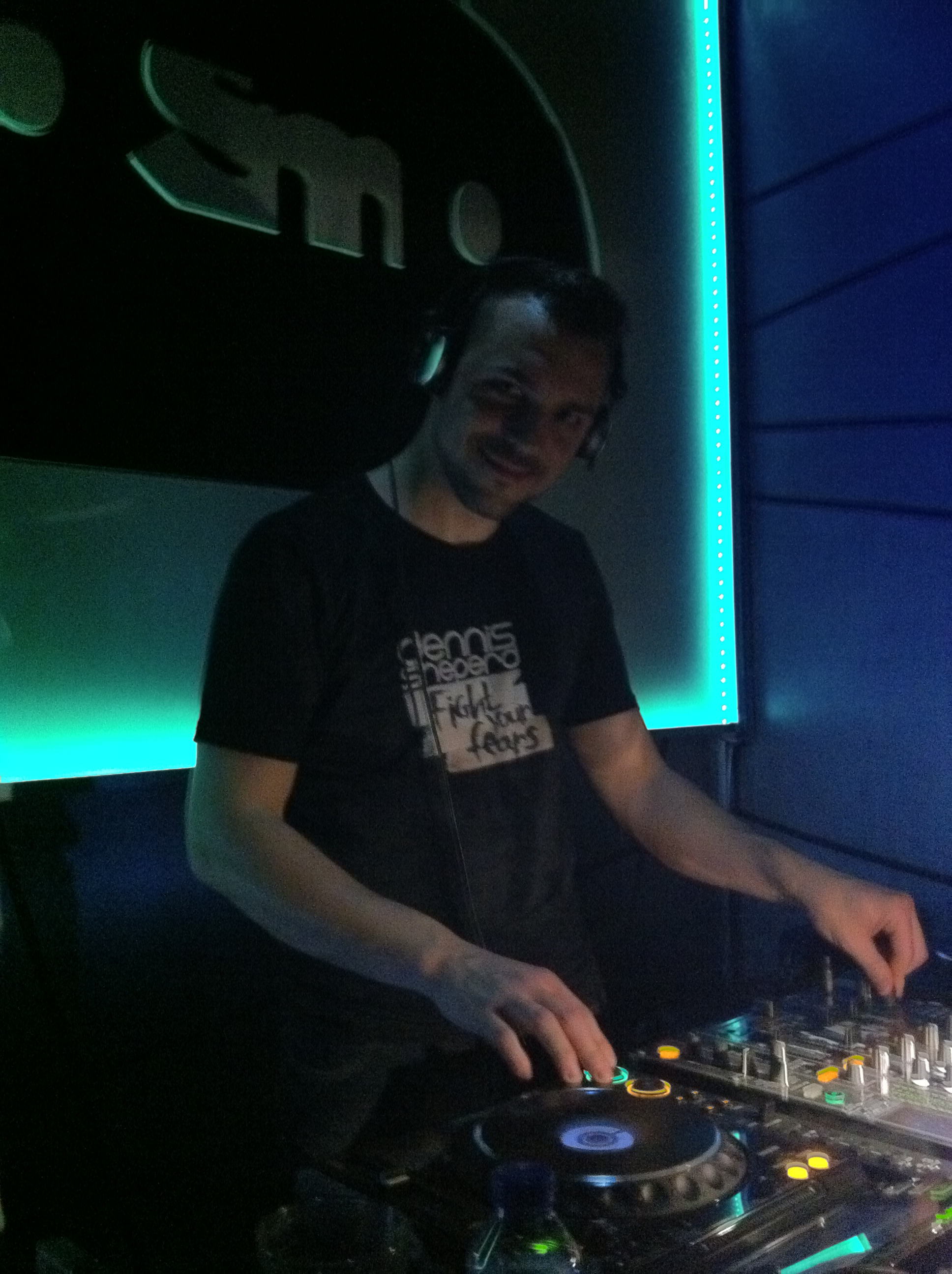 Денис Шепърд в Cosmo, София, на „Album Release Party“